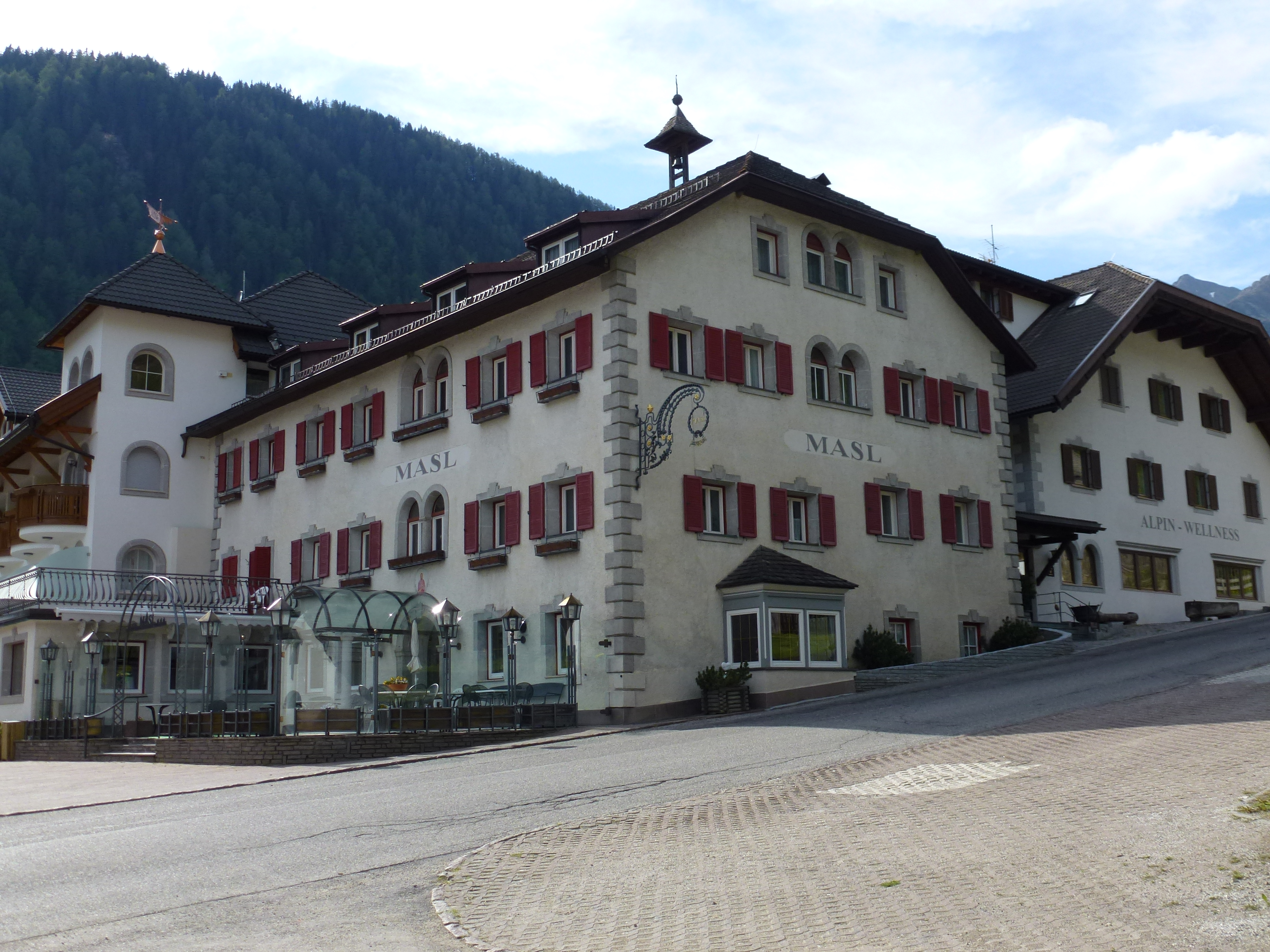 Masl, Vals (Mühlbach)